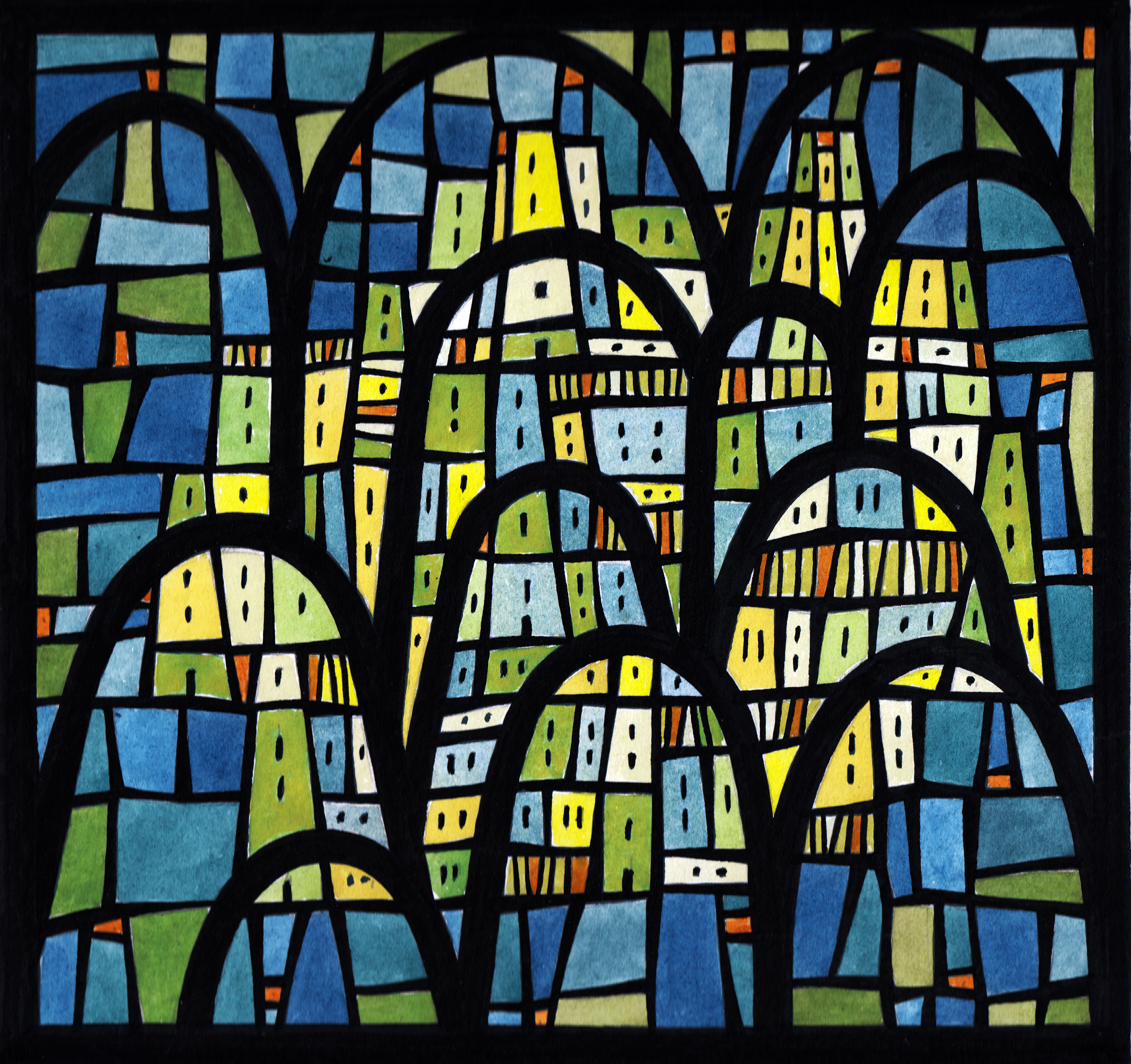 Günter Johl, "Das Zwöltorige Jerusalem" (1959), farbiger Fensterentwurf für die evangelische Kirche in Rothemühle. Der Entwurf befindet sich im Besitz der Tochter des Künstlers, Amadee Vorsteher-Johl.